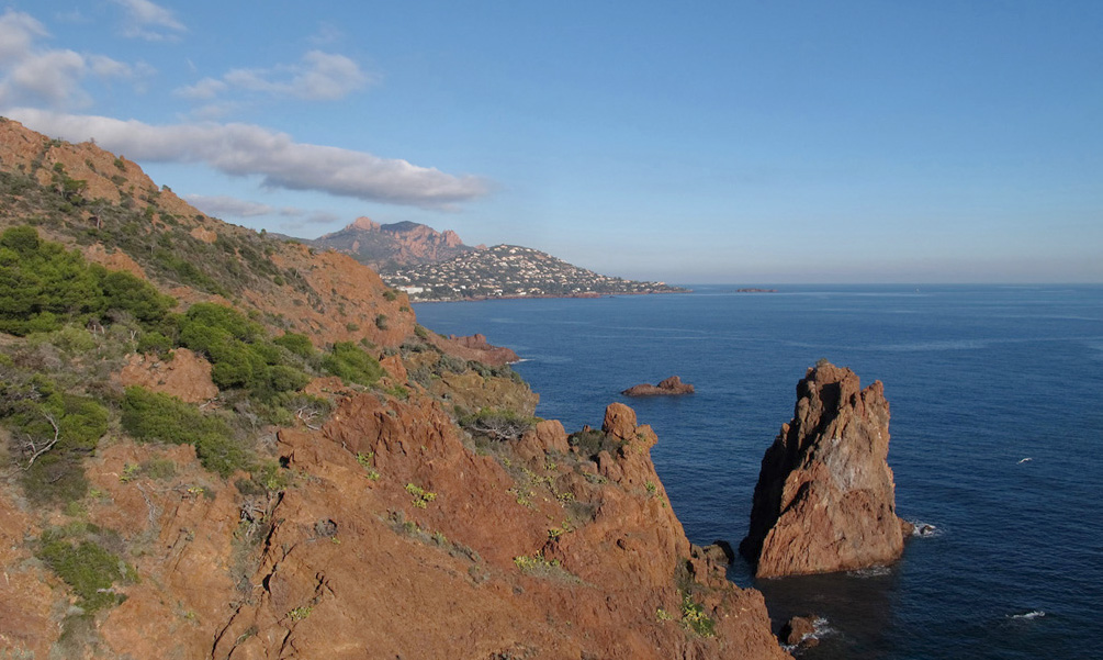 Anthéor et le Massif de l’Esterel (Pic du Cap Roux). Vue du Cap du Dramont, PACA, France.